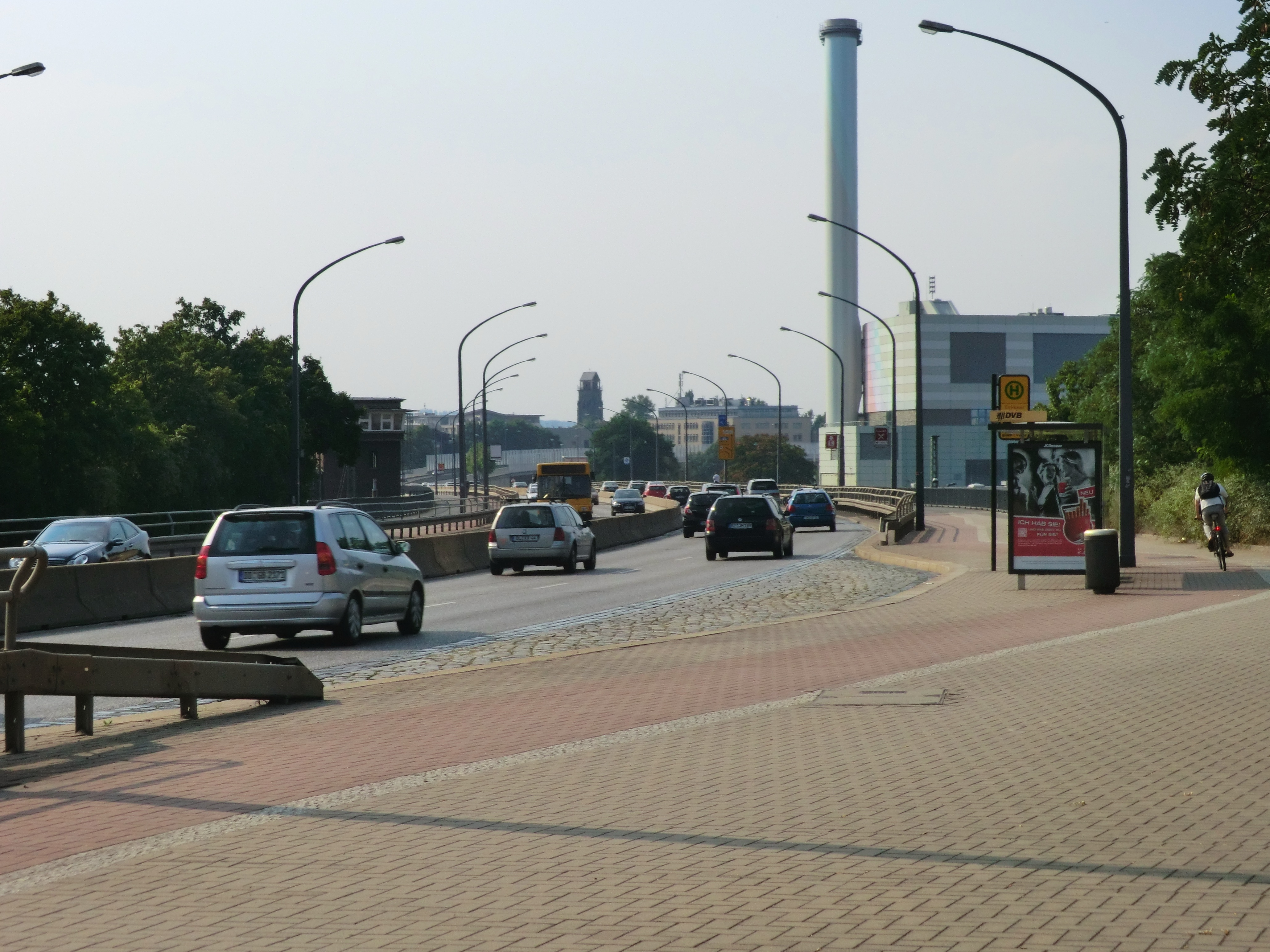 Nossener Brücke in Dresden-Südvorstadt/Löbtau (B 173)